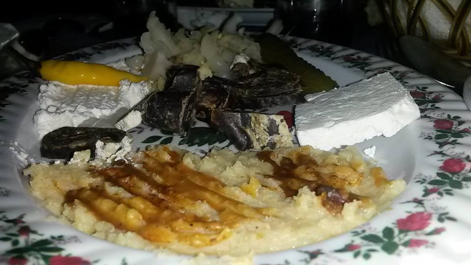 Nje pjate meze tradicionale e fshatit Shishtavec